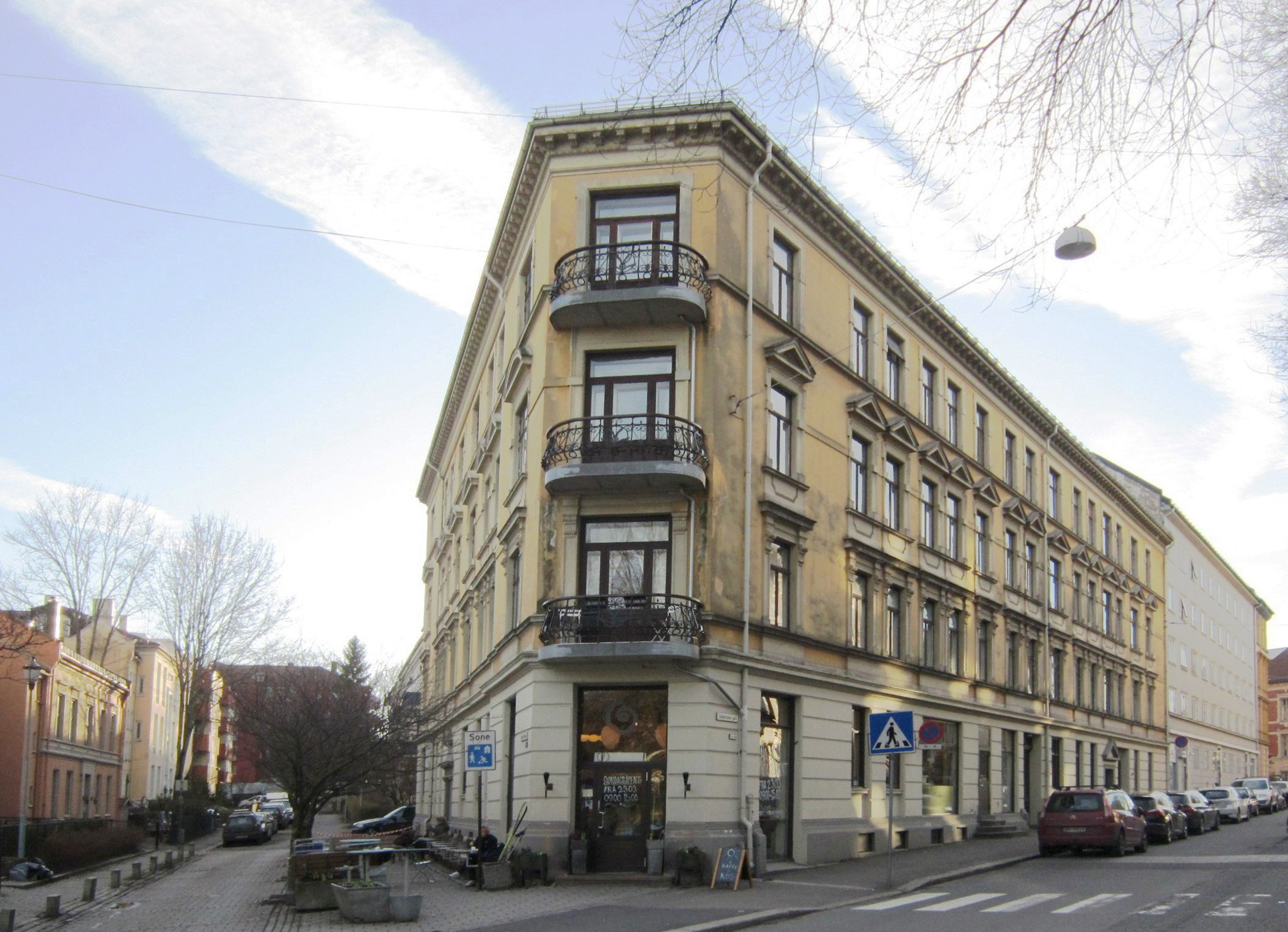 Åpent bakeri, Inkognito terrasse 1. Inkognito terrasse går inn til venstre, mens Colbjørnsens gate er på høyre side av bygget.